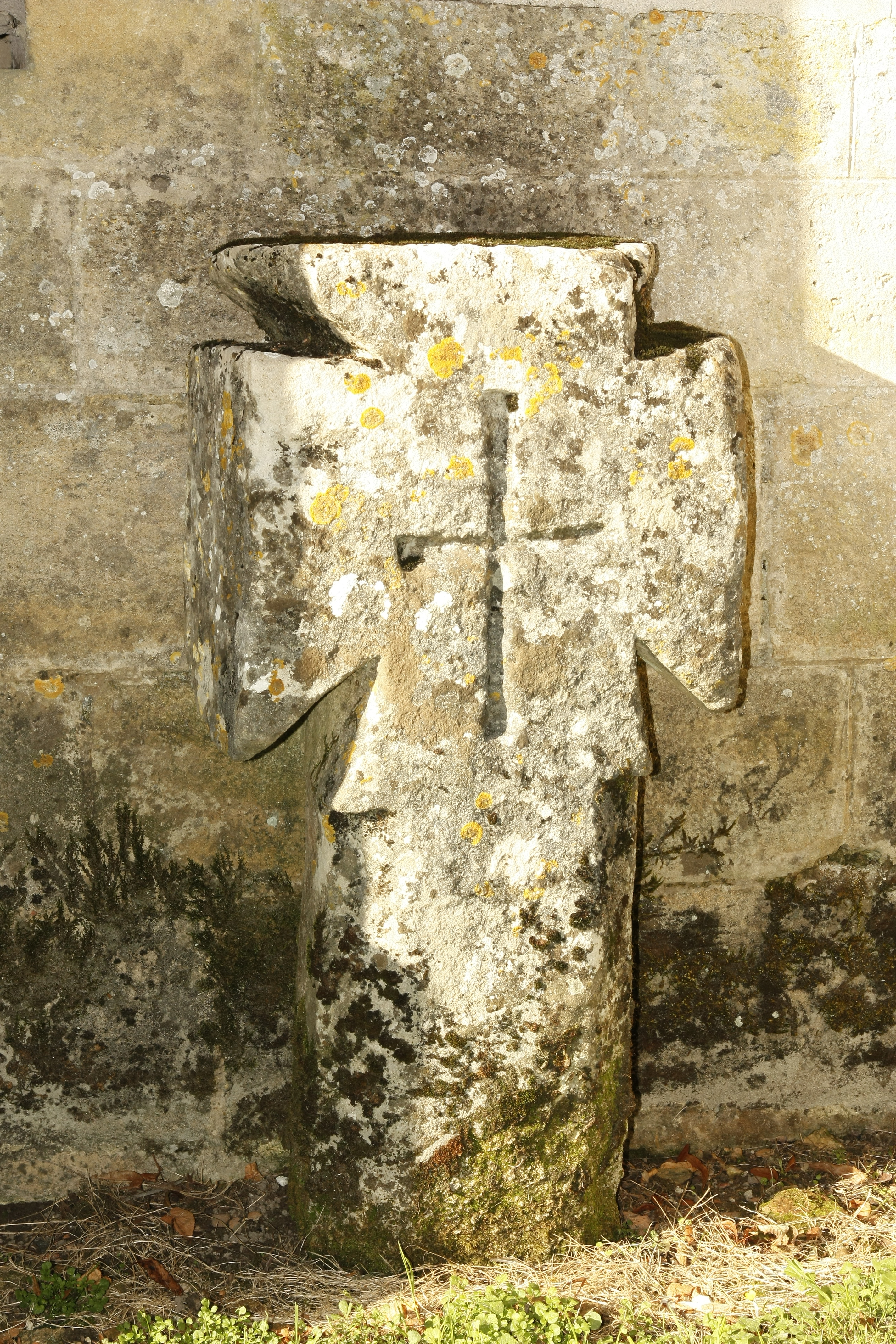 Croix pattée typique du Vexin français adossée à la nef de l'Eglise de Théméricourt .